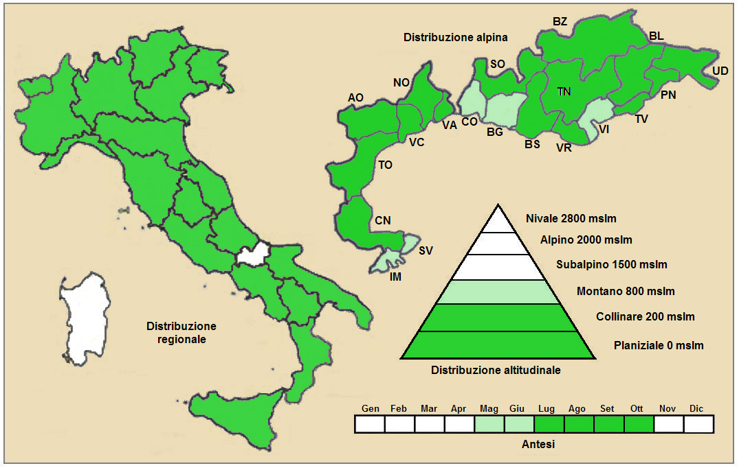 Clinopodium menthifolium menthifolium - Distribuzione